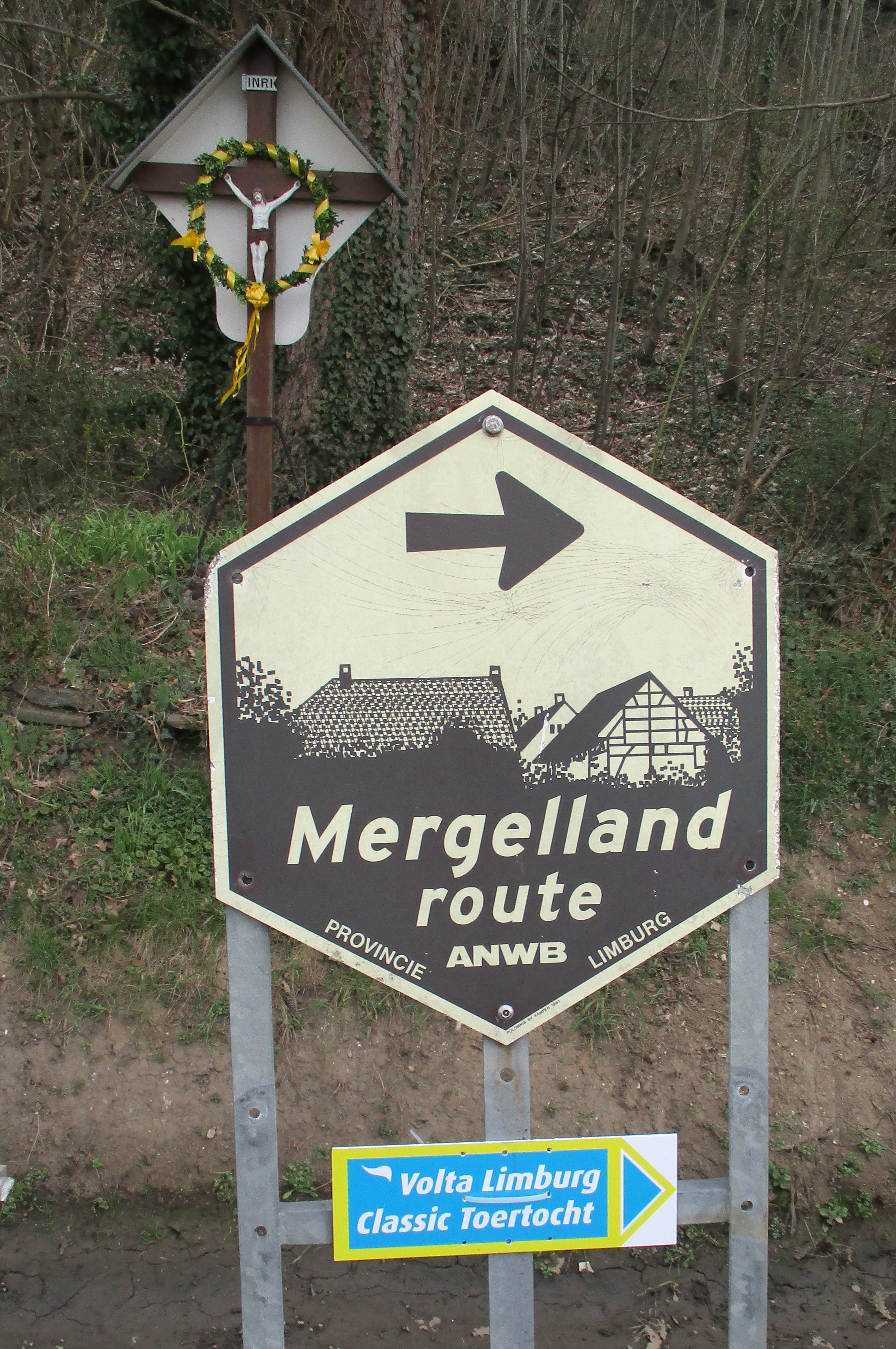 Volta Limburg Classic 2018